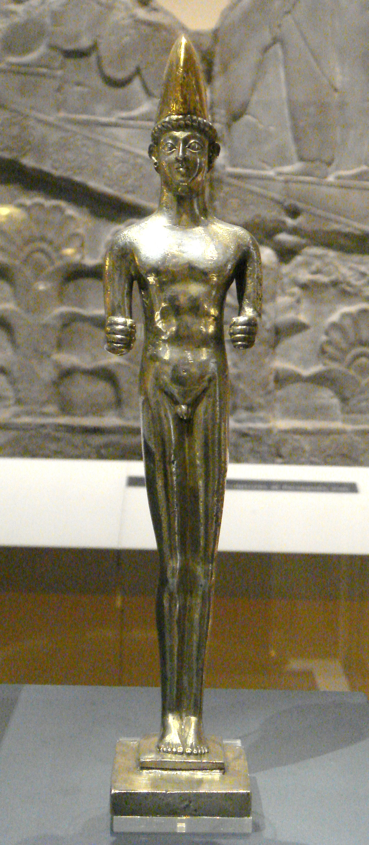 Oxus_treasure statuette